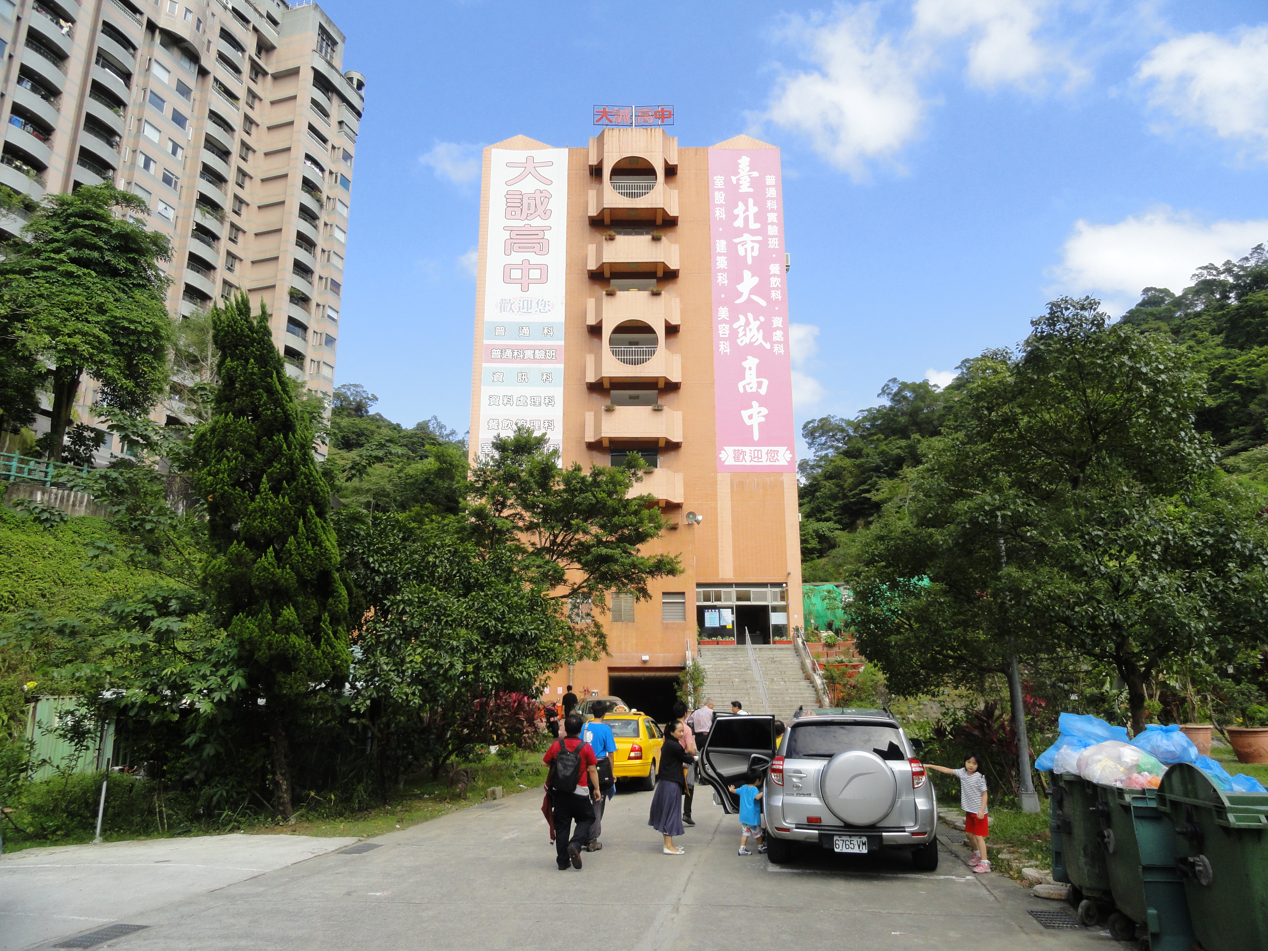 中文（中国大陆）: 台北市私立大诚高级中学